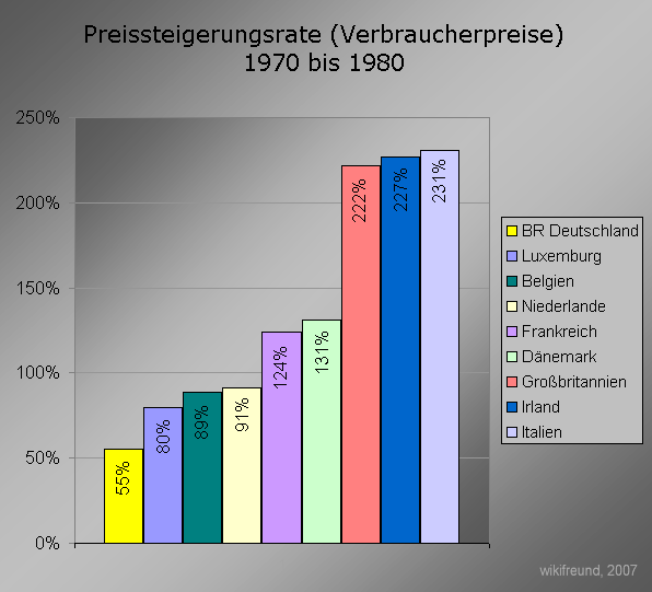 Grafik der Preissteigerungsrate (Verbraucherpreise) in der Europäischen Gemeinschaft (EG) von 1970 bis 1980. Datenquelle: Presse- und Informationsamt der Bundesregierung, Bonn, März 1981